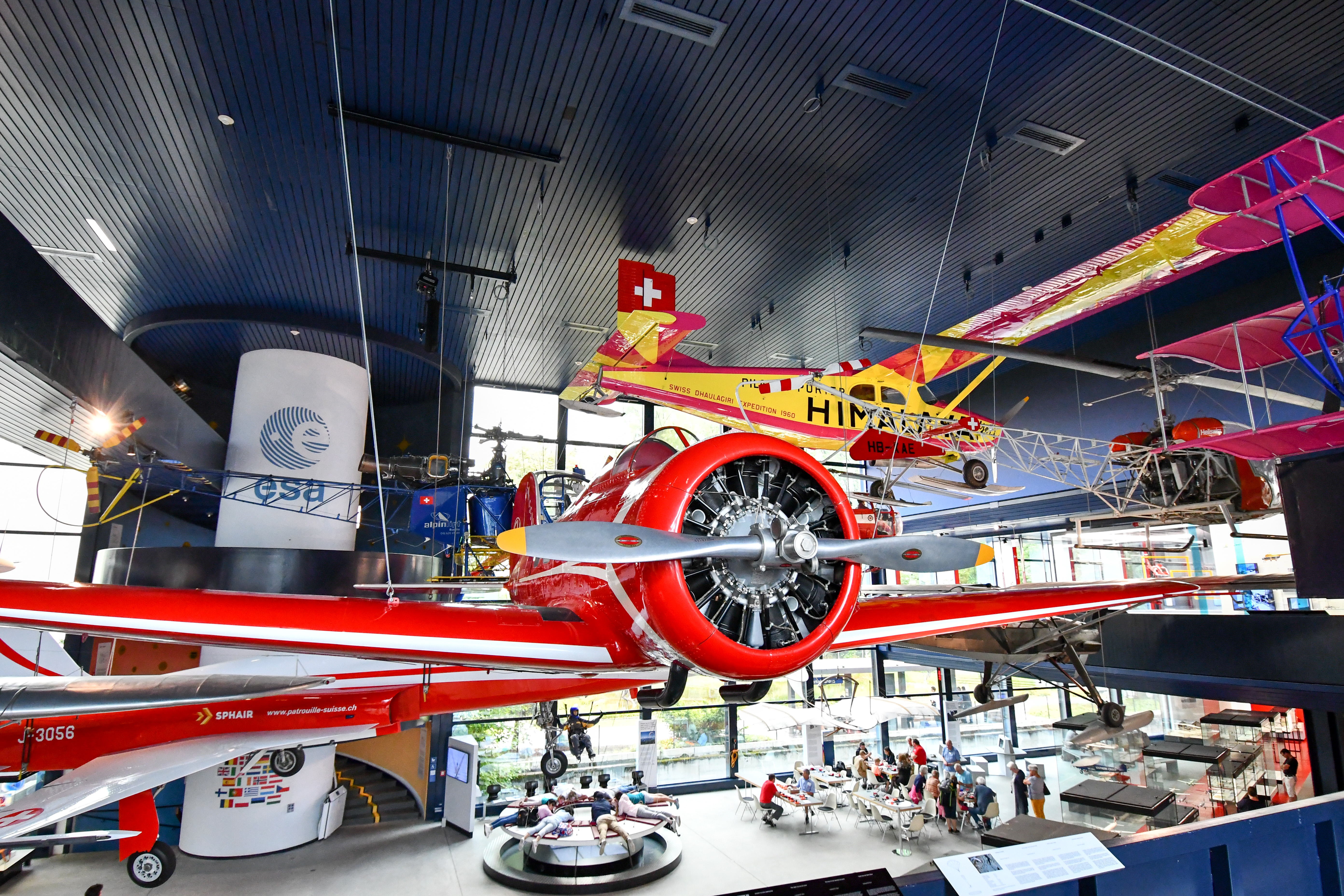 Die Luftfahrt-Halle im Verkehrshaus der Schweiz.